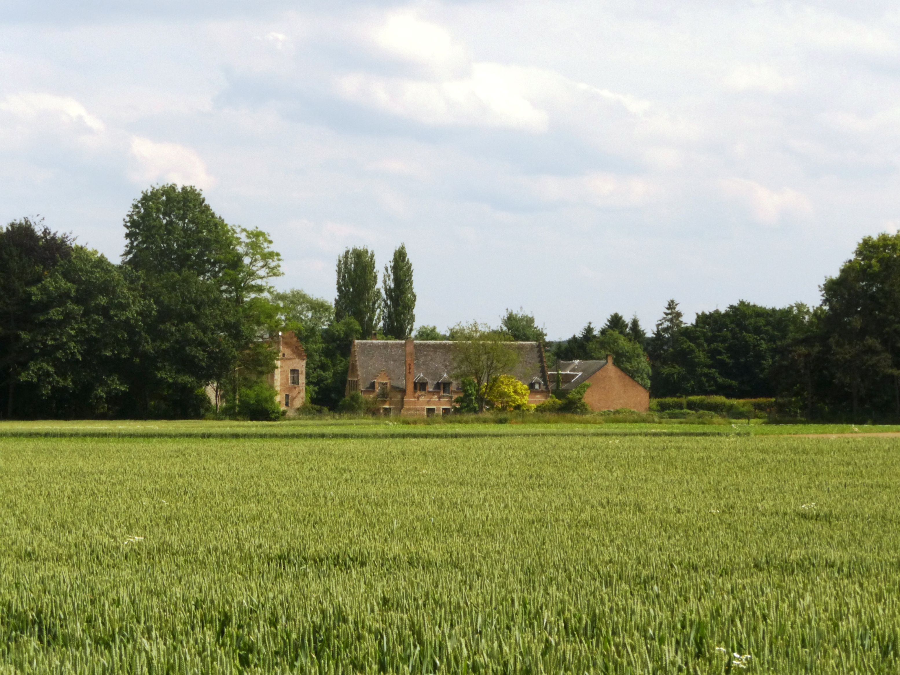 Poddegemhoeve gezien vanuit de velden bij het Lintbos, Grimbergen (Vlaams-Brabant, België).